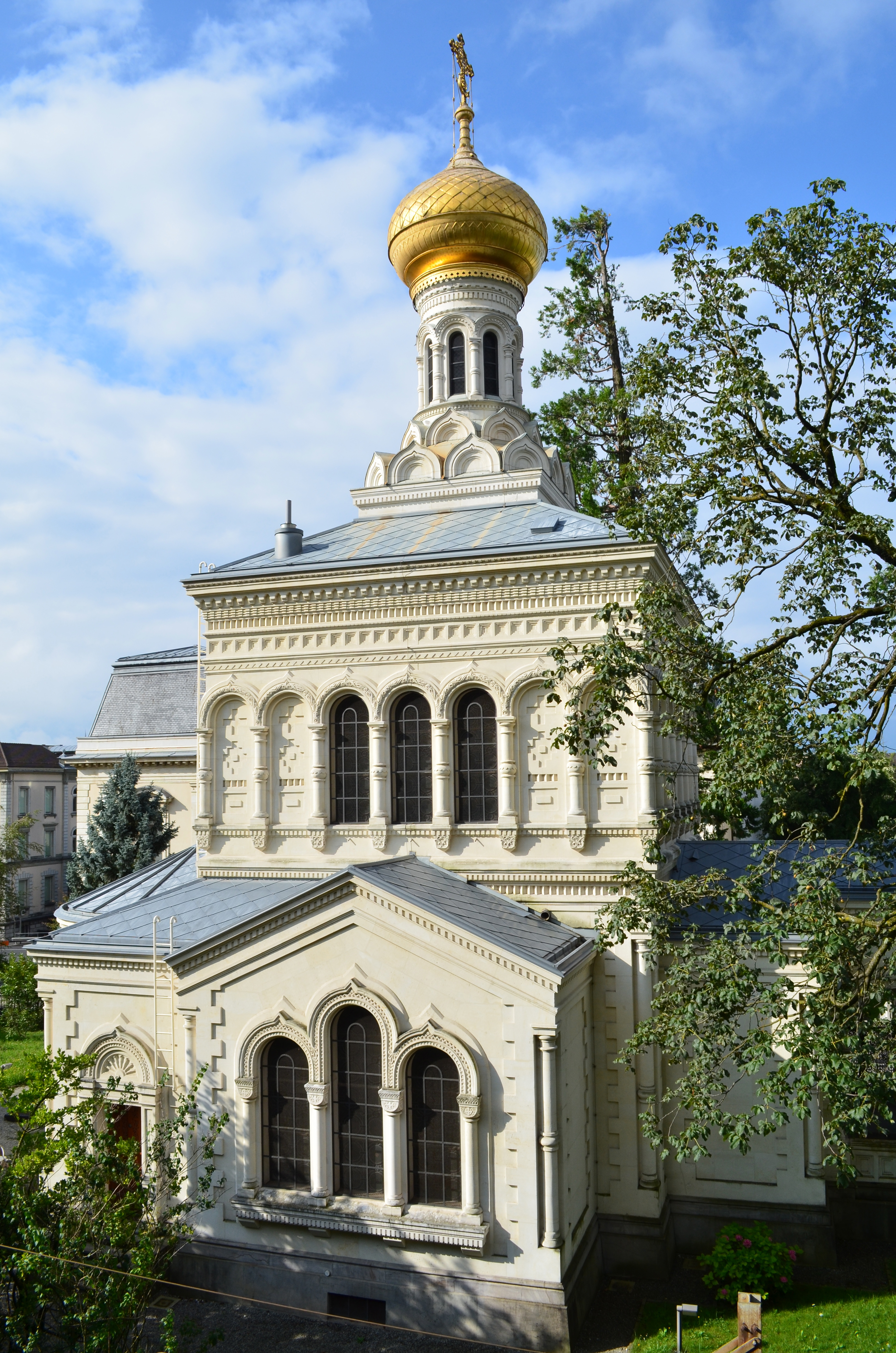 Église orthodoxe russe de Vevey